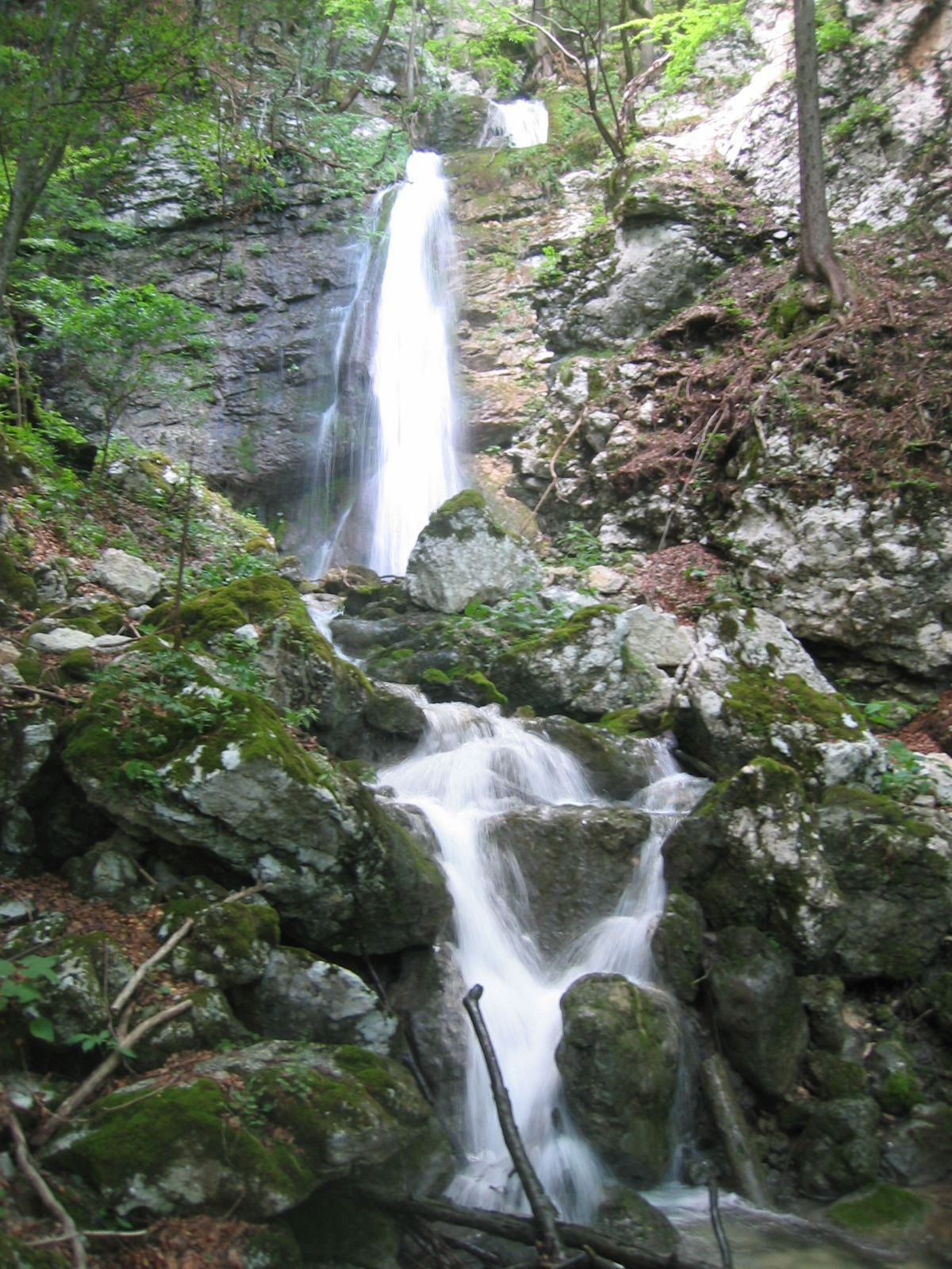 Koritniški slapovi near Nomenj (Bohinj), Slovenia